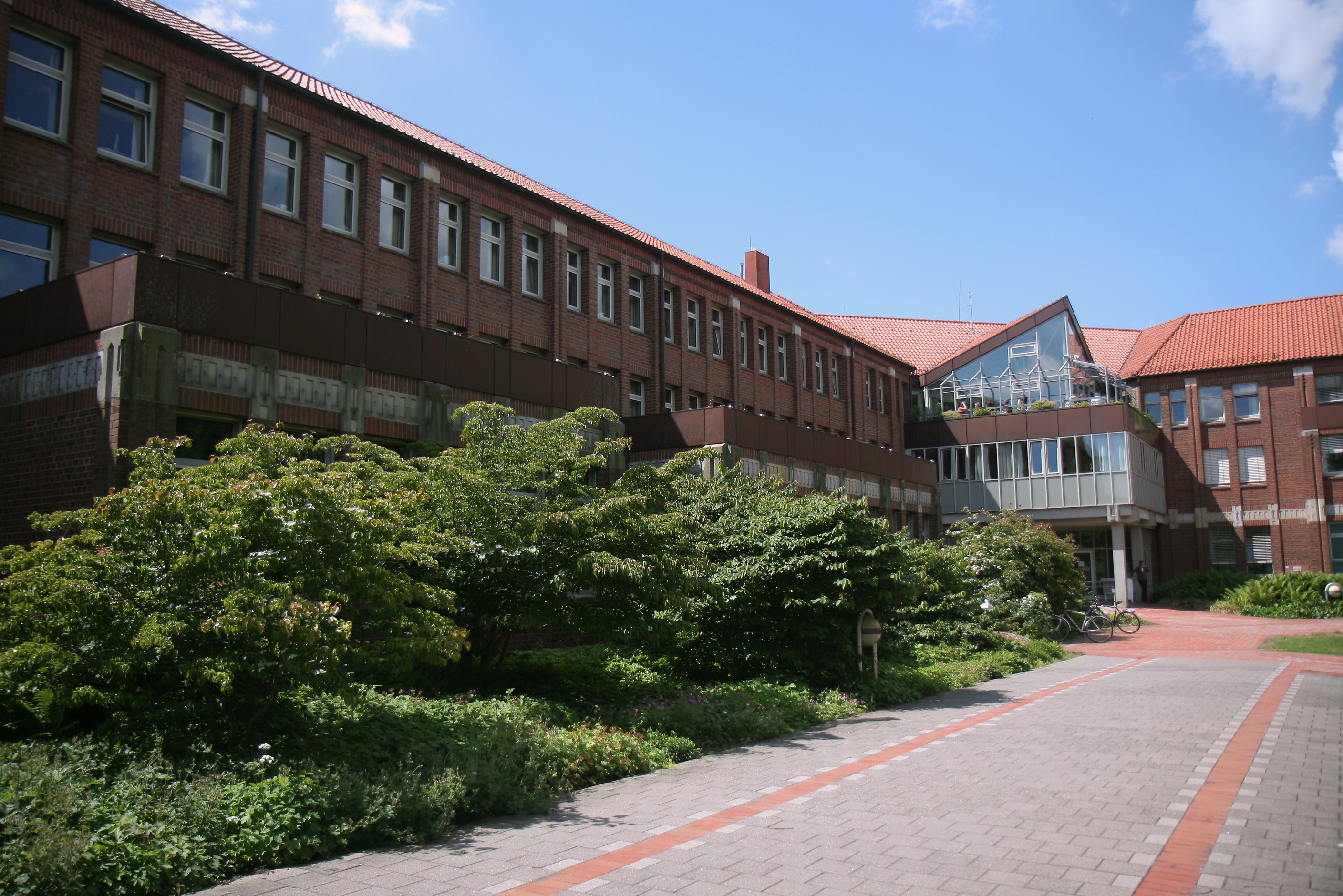 Schleswig-Holsteinisches Landesverfassungsgericht, Schleswig-Holsteinisches Oberverwaltungsgericht, Schleswig-Holsteinisches Verwaltungsgericht und Sozialgericht Schleswig in Schleswig, Brockdorff-Rantzaustraße 13.